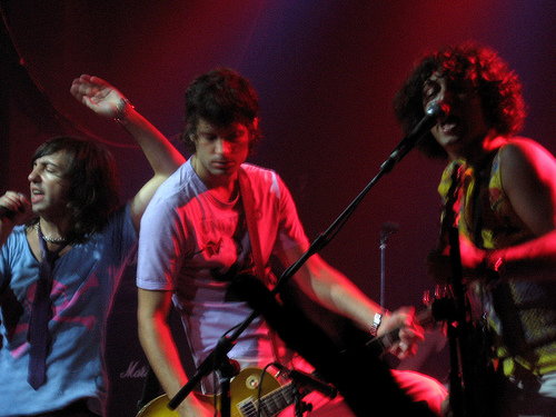 Babasónicos en concierto.